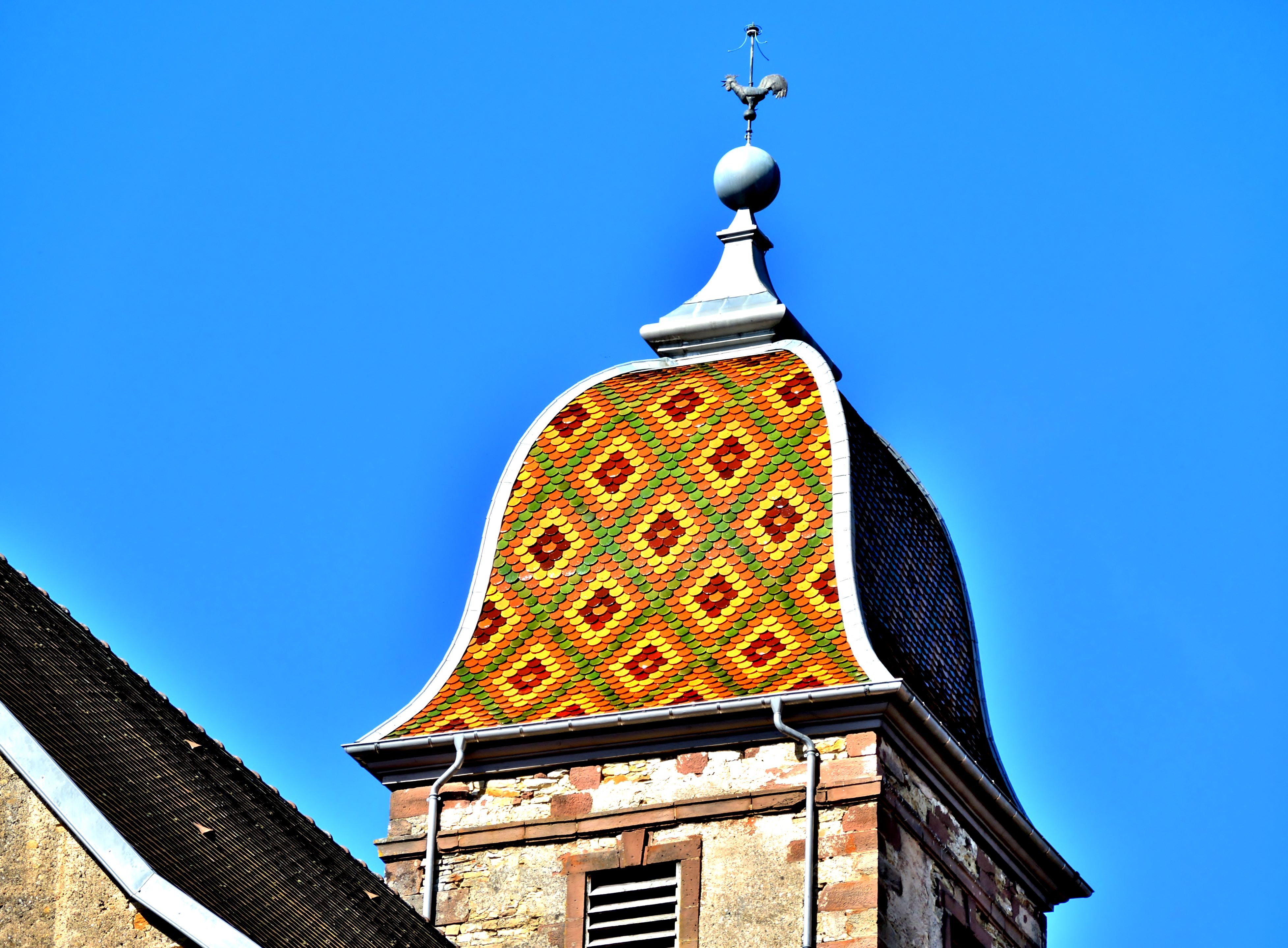 Clocher du temple du village d'Aibre. Doubs.